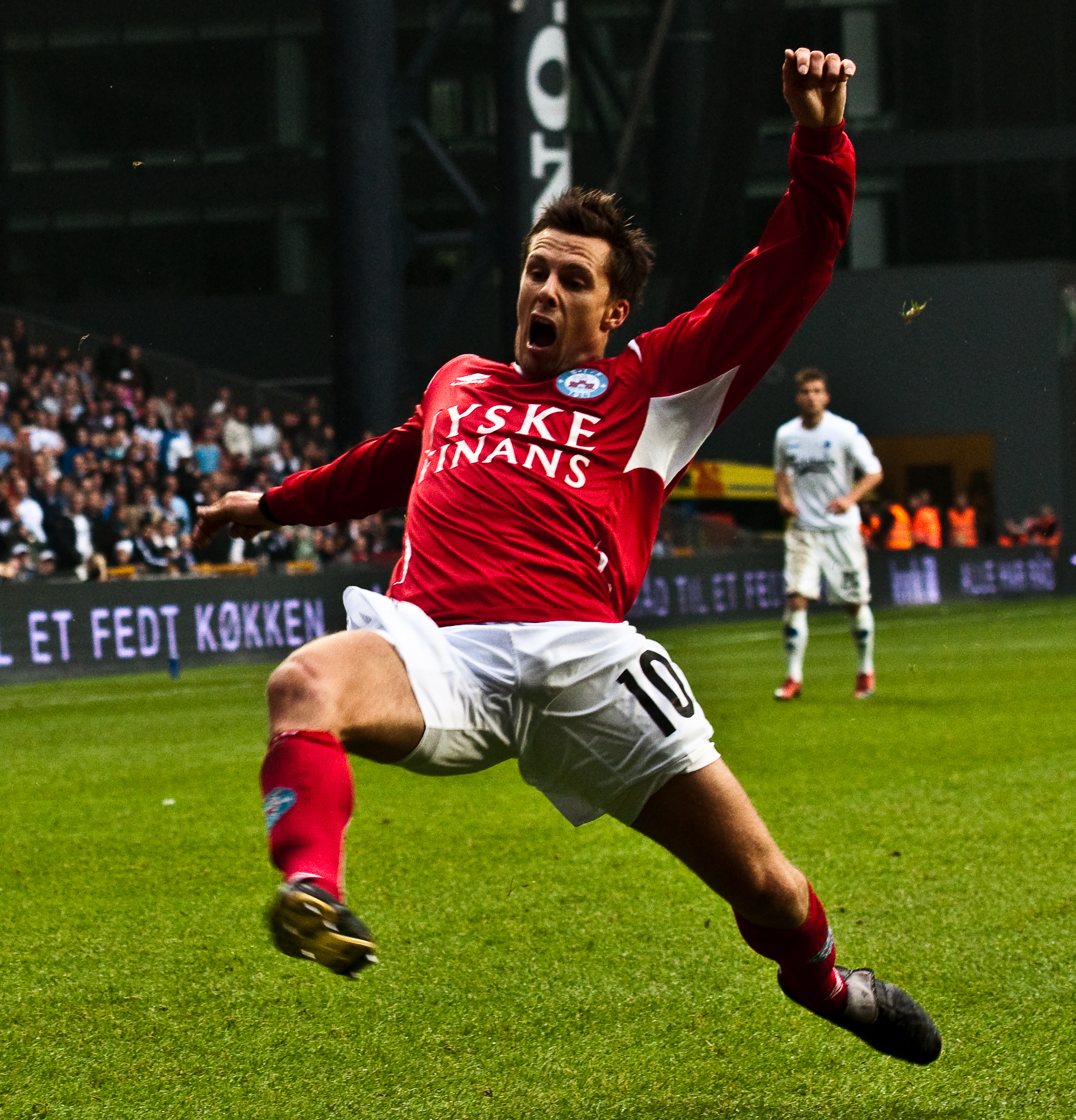 FCK vs. Silkeborg